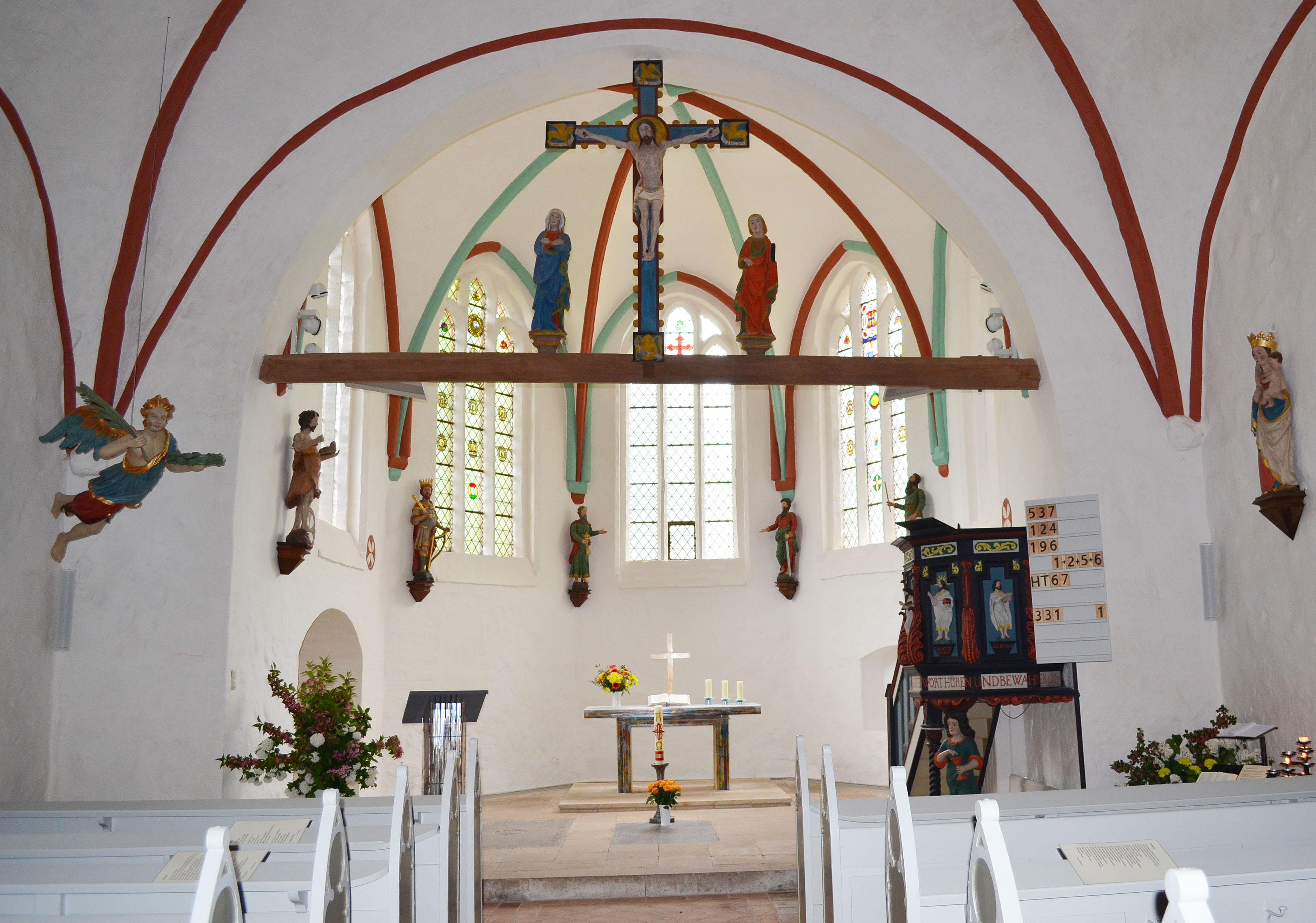 Kühlungsborn, Schlossstraße, ev. Johanniskirche, Altarraum 3